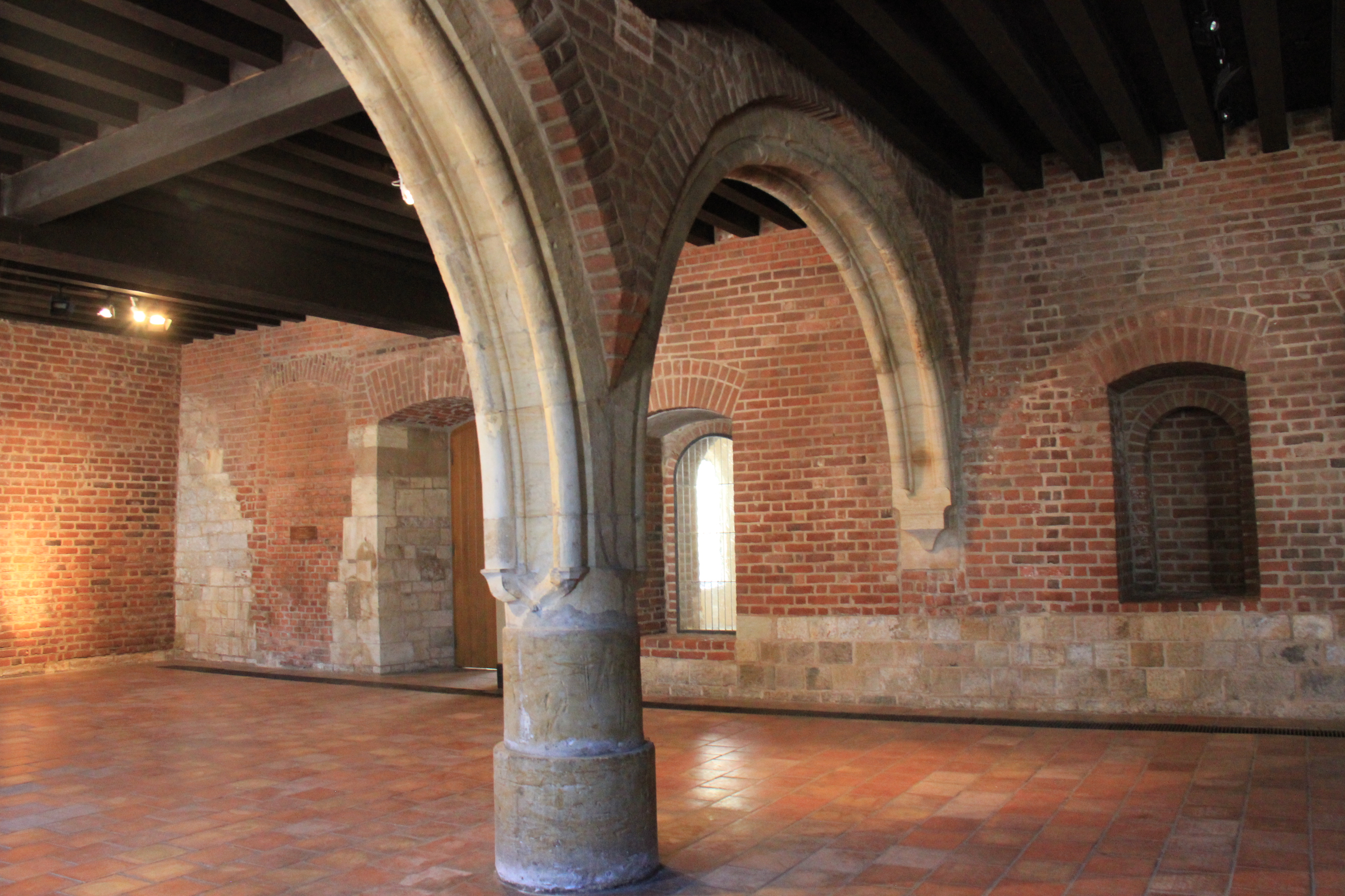 Колона разделяет простор на 2 части: трапезную и скрипторий.